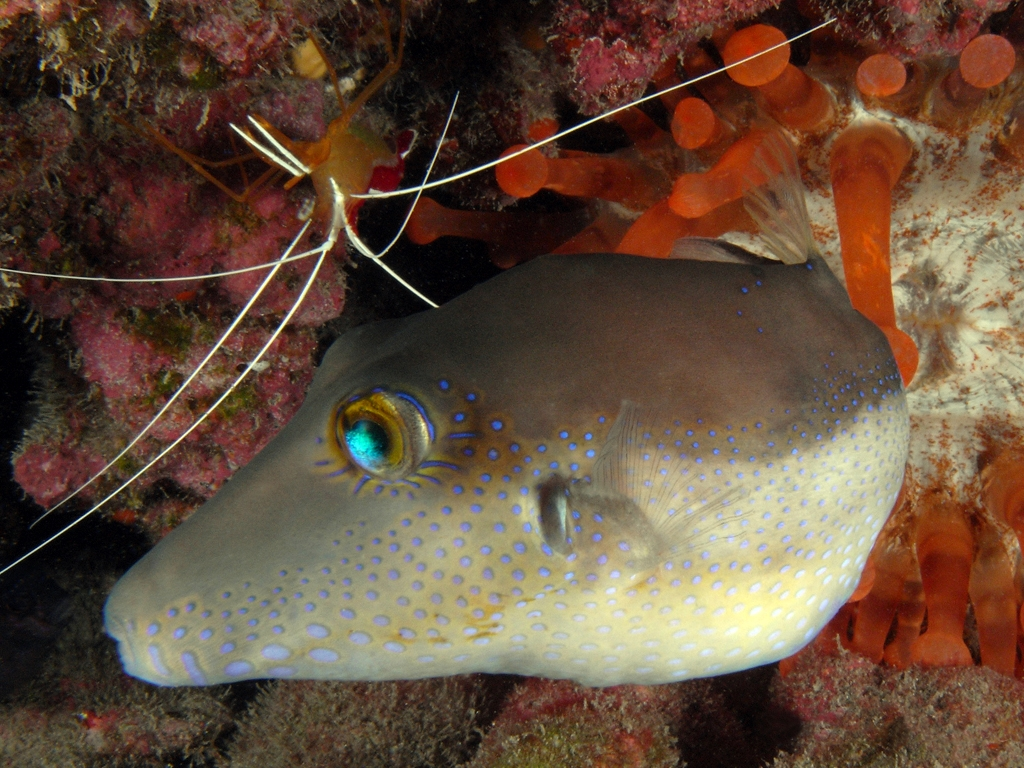 Canthigaster capistrata - Macaronesian sharpnose-puffer / Gallinita (Tamboril azul) / Tétrodon nain, Tenerife.